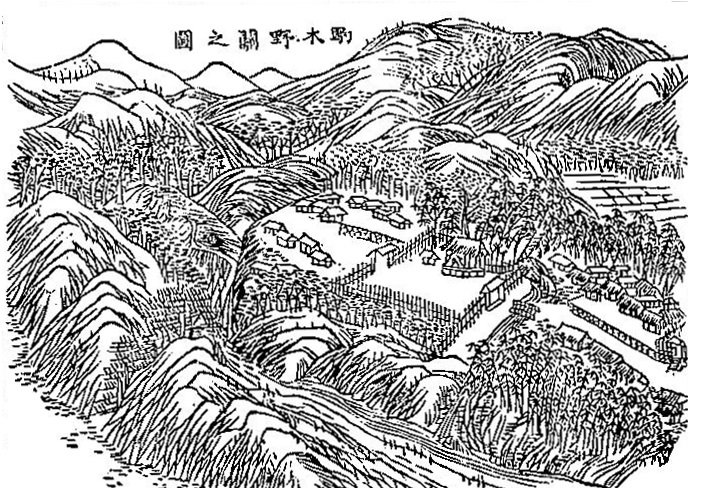 駒木野（小仏）関所の図（新編武蔵風土記稿. 巻之103 多磨郡之15,上長房村（附駒木野宿、小仏宿）コマ番号21 改変。駒木野関之図） 国立国会図書館デジタルコレクション:インターネット公開（保護期間満了）